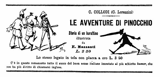 Pubblicità della prima edizione di "Le Avventure di Pinocchio" pubblicata il 14 febbraio 1883 nel giornale "Corriere del Mattino"